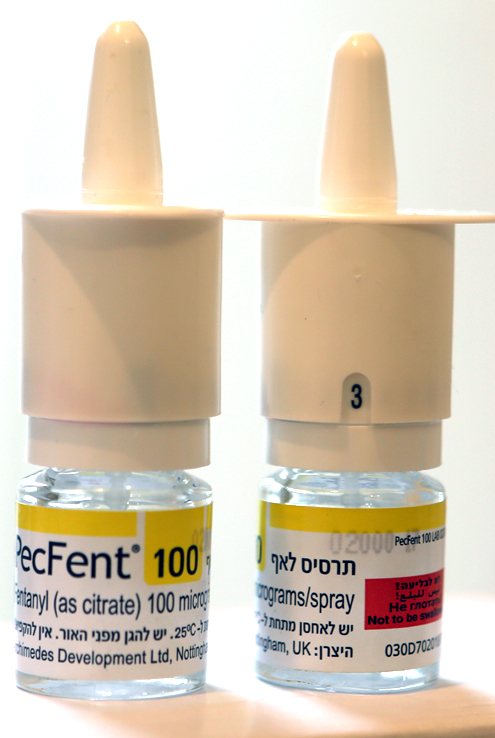 תרסיס פקפנט במינון של 100 מיקרוגרם בכל ריסוס. ניתן להבחין במונה מימין, המסמן את מספר השימושים בתכשיר. בכל תכשיר 8 ריסוסים.